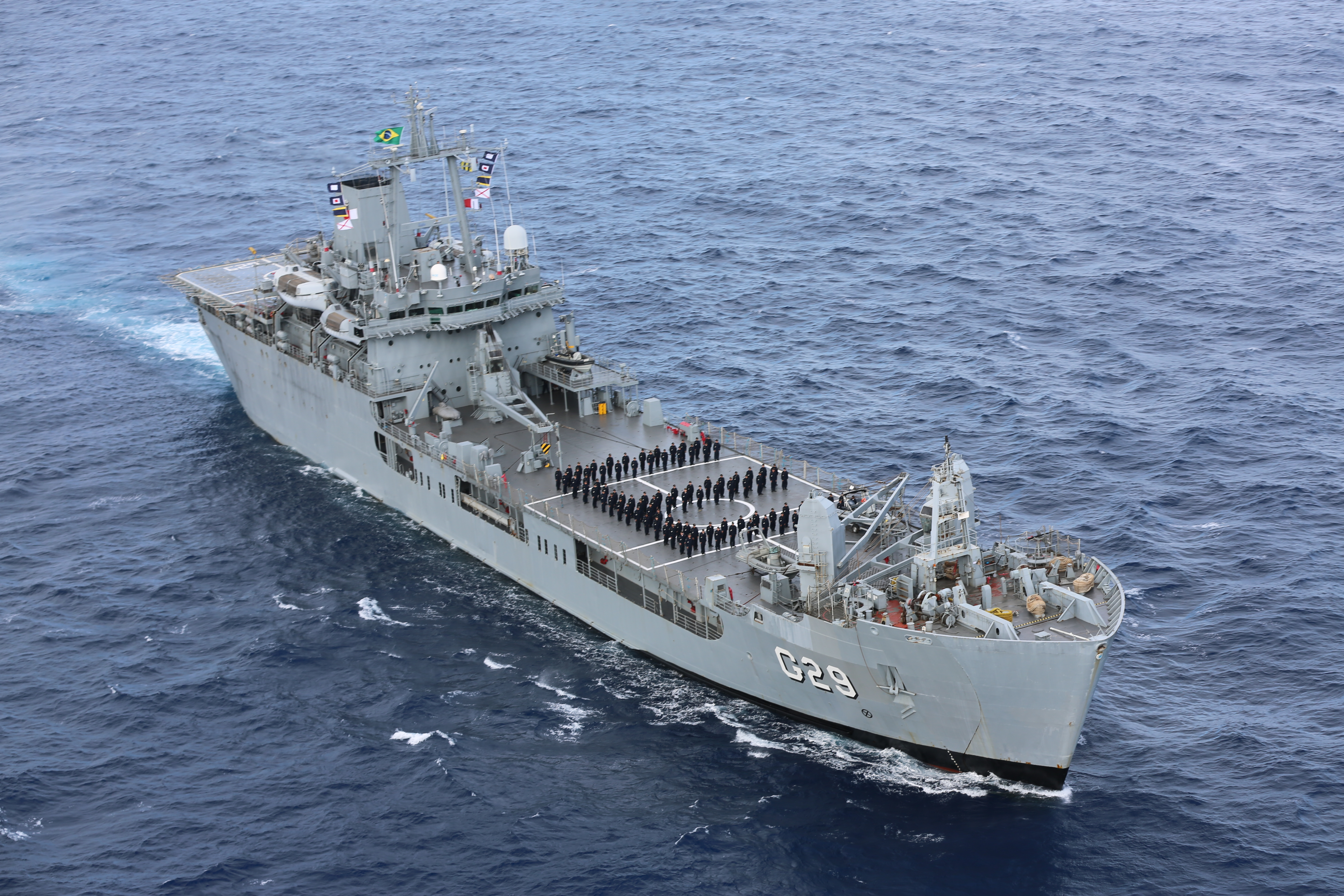 Arquivo liberado pela Marinha do Brasil através de projeto GLAM com Wiki Educação Brasil